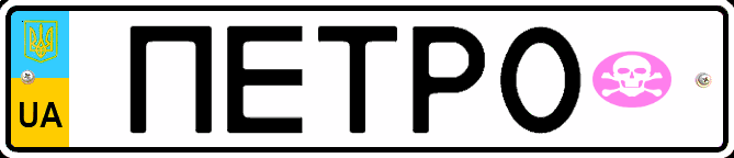 Индивидуальный автомобильный номерной знак Украины, стандарт 2004 года